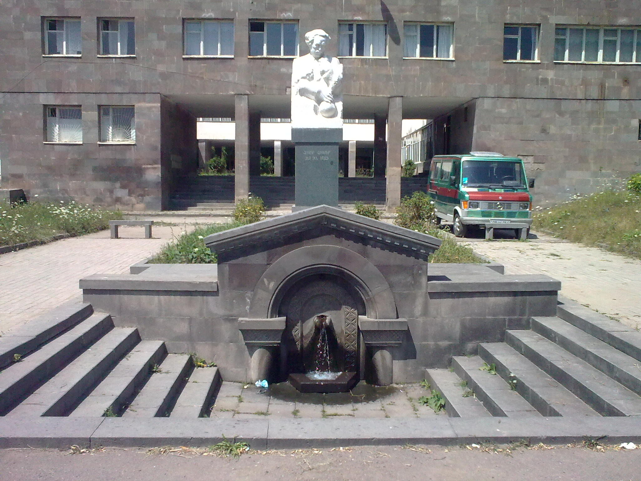 Գուսան Աշոտի հուշարձան, Գորիս 3/132